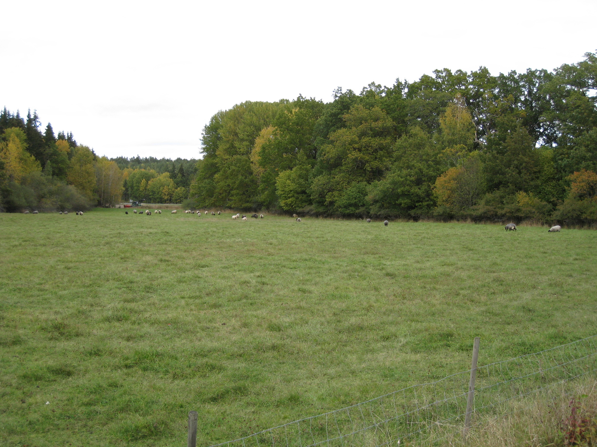 Högby läsidesmorän från väster, Viksjö, Järfälla, Stockholms län.